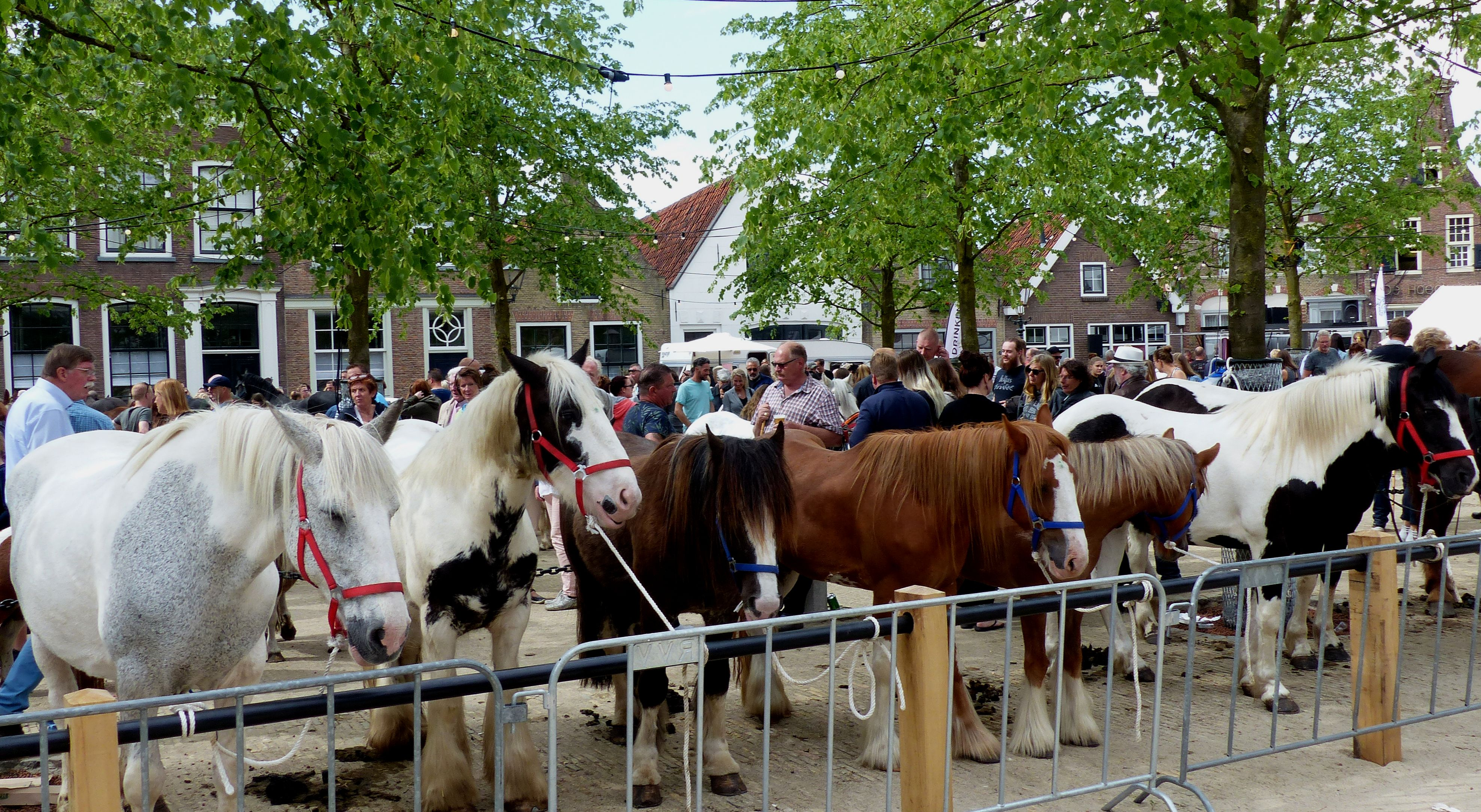 Paardenmarkt Heenvliet 2018 - paarden